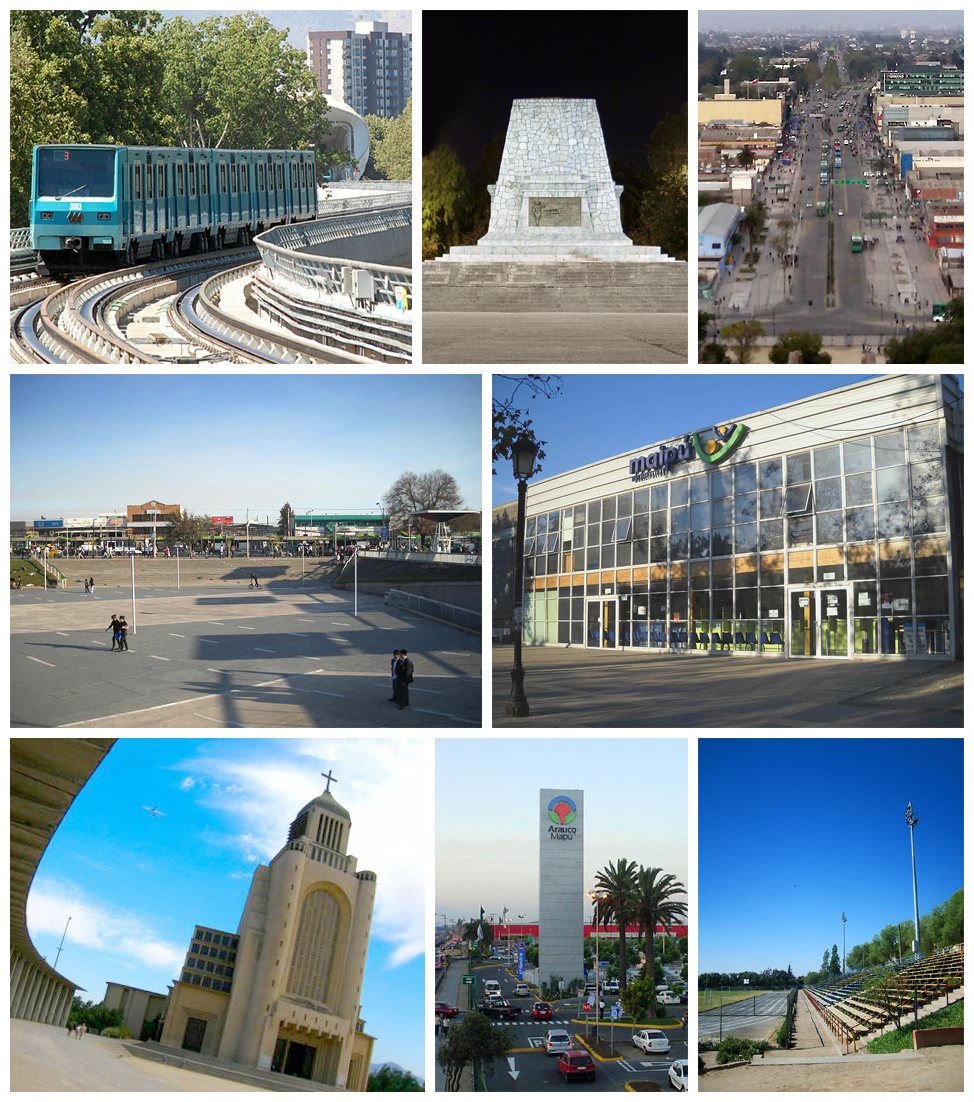 Collage de imágenes de la comuna de Maipú, en Santiago de Chile. De izquierda a derecha: el Metro llega a Maipú, Monumento a los Vencedores de los Vencedores de Bailén, avenida 5 de Abril, Plaza de Armas de Maipú, Teatro Municipal de Maipú, Templo Votivo de Maipú, Mall Arauco Maipú y Estadio Santiago Bueras. Trabajo derivado de: File:El Metro en Maipú 2.jpg File:Monumento a los Vencedores de los Vencedores de Bailén.jpg File:Mirador del Templo Votivo de Maipú 08.jpg File:Plaza de Armas de Maipú 1.jpg File:Teatro Municipal de Maipú.jpg File:Templo Votivo de Maipú.jpg File:Wiki1 mall maipu1.jpg File:Estadio Santiago Bueras.jpg